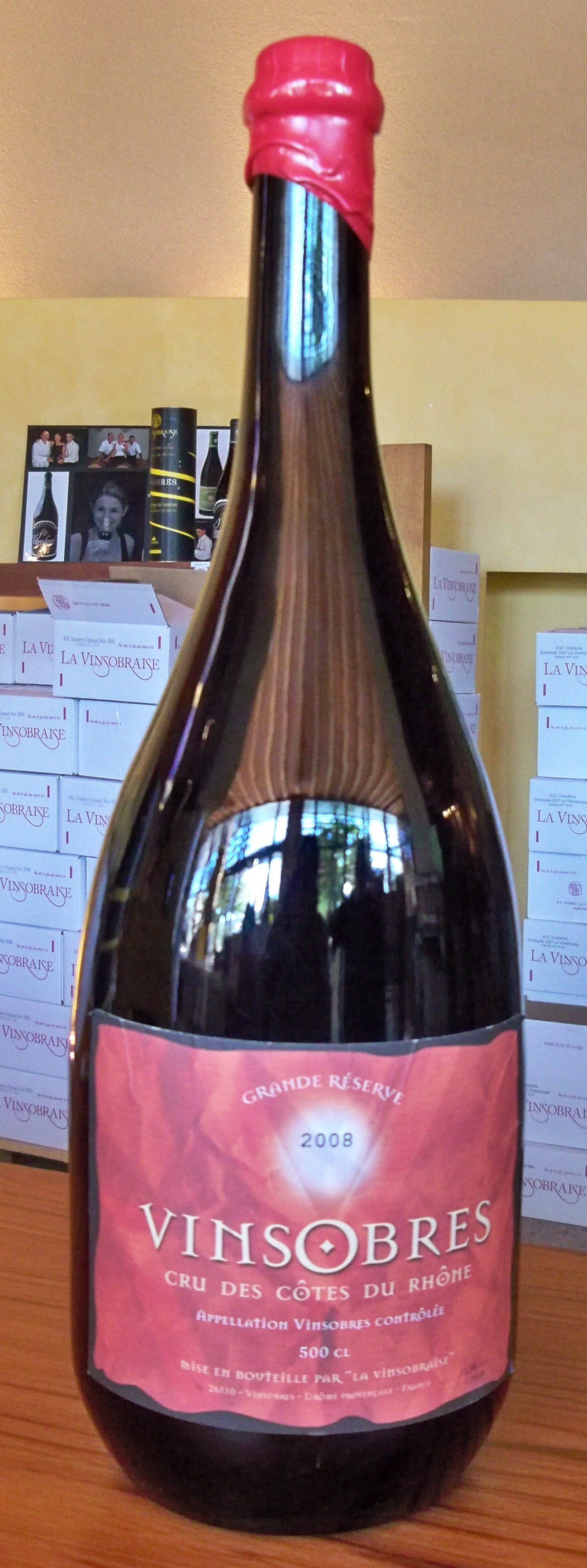 Bouteille de Cotes du Rhone de Vinsobres, Drôme, France